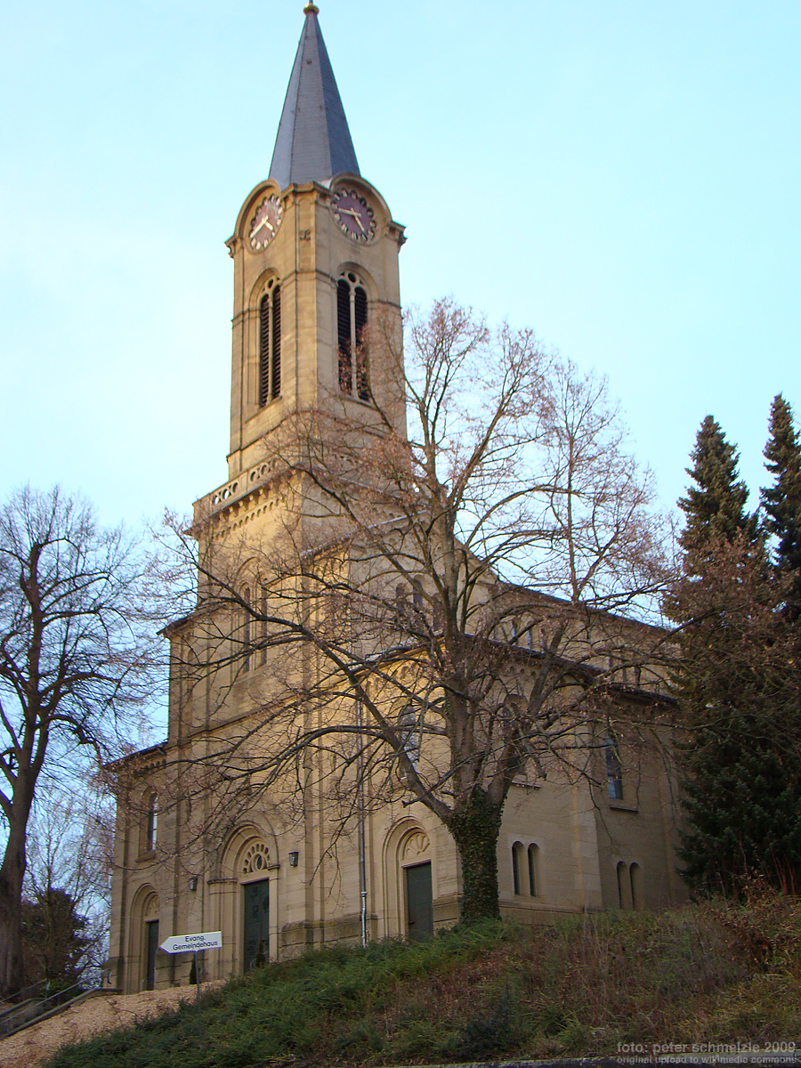 Evang. Kirche in Eppingen